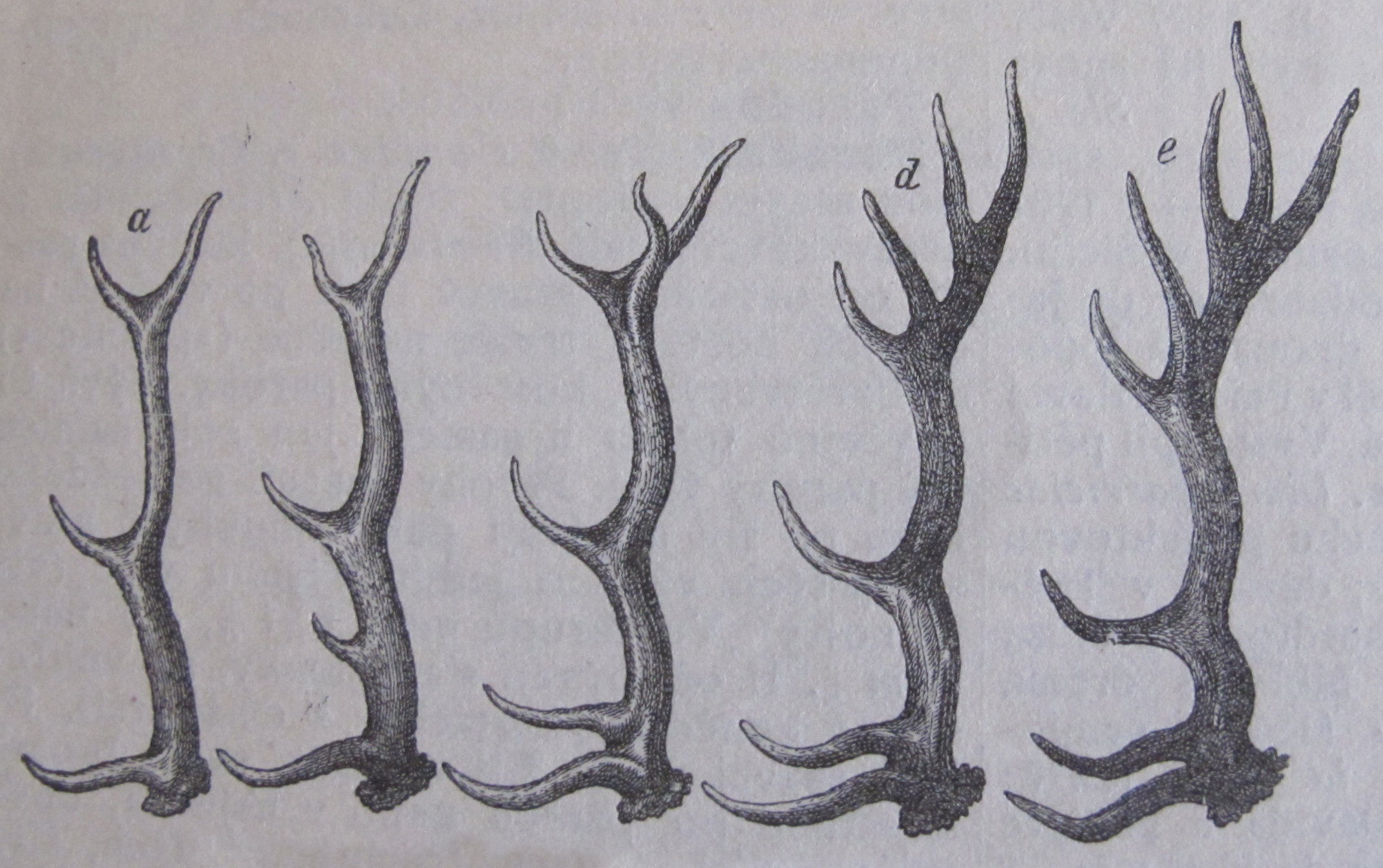 Původní popisek: Č. 3056. Parohy jelení: a) osmeráka, b) desateráka atd.